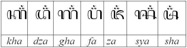 Javanese letters meant for foreign sounds